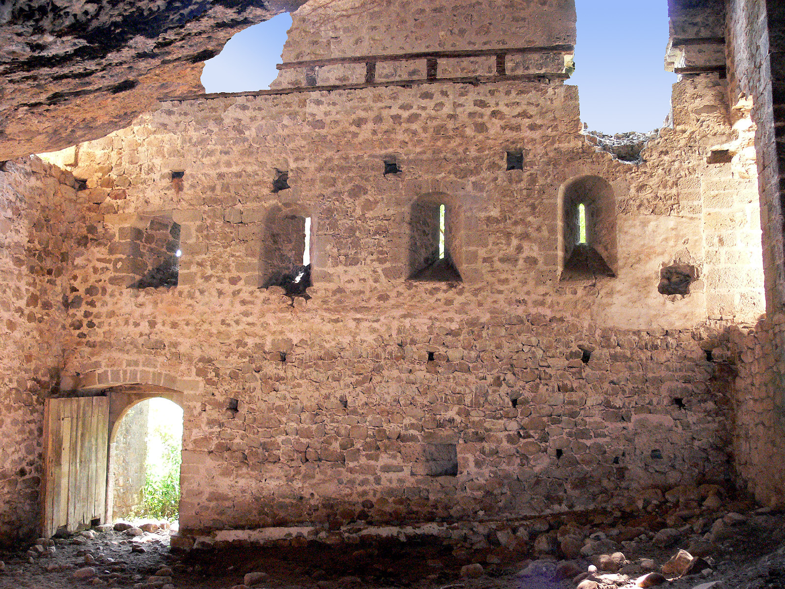 Castillo Cueva de Castañares de las Cuevas, La Rioja - España.